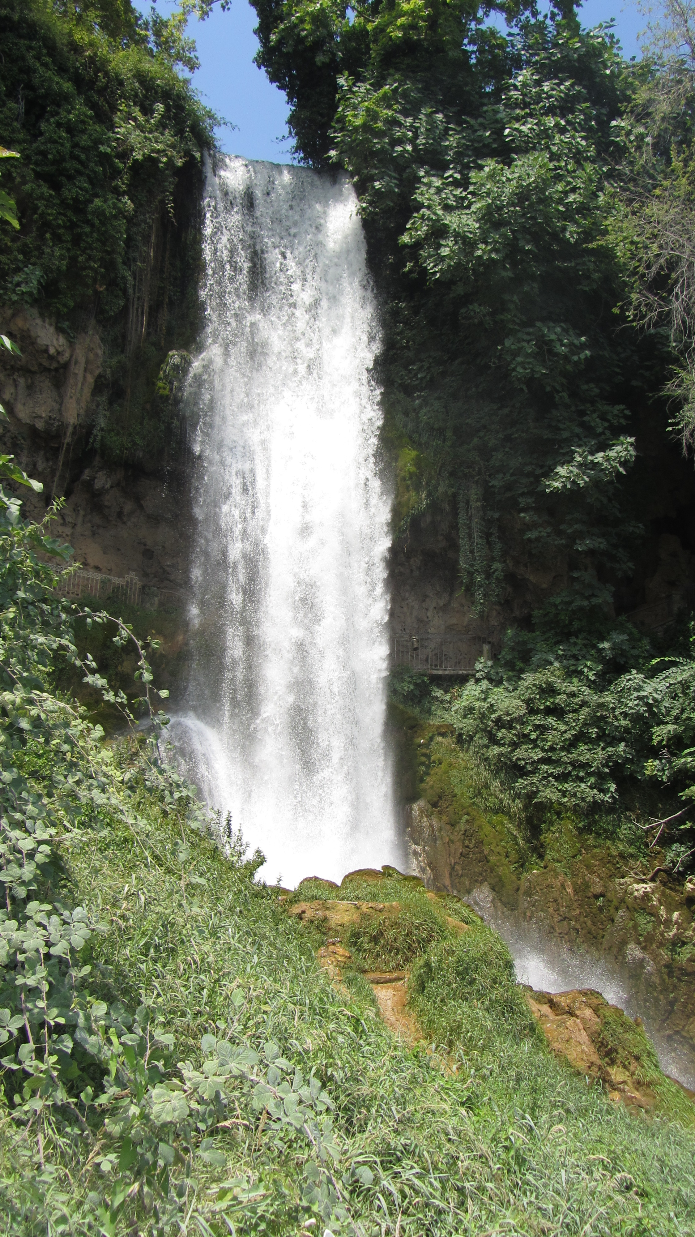 Водопад в Эдессе